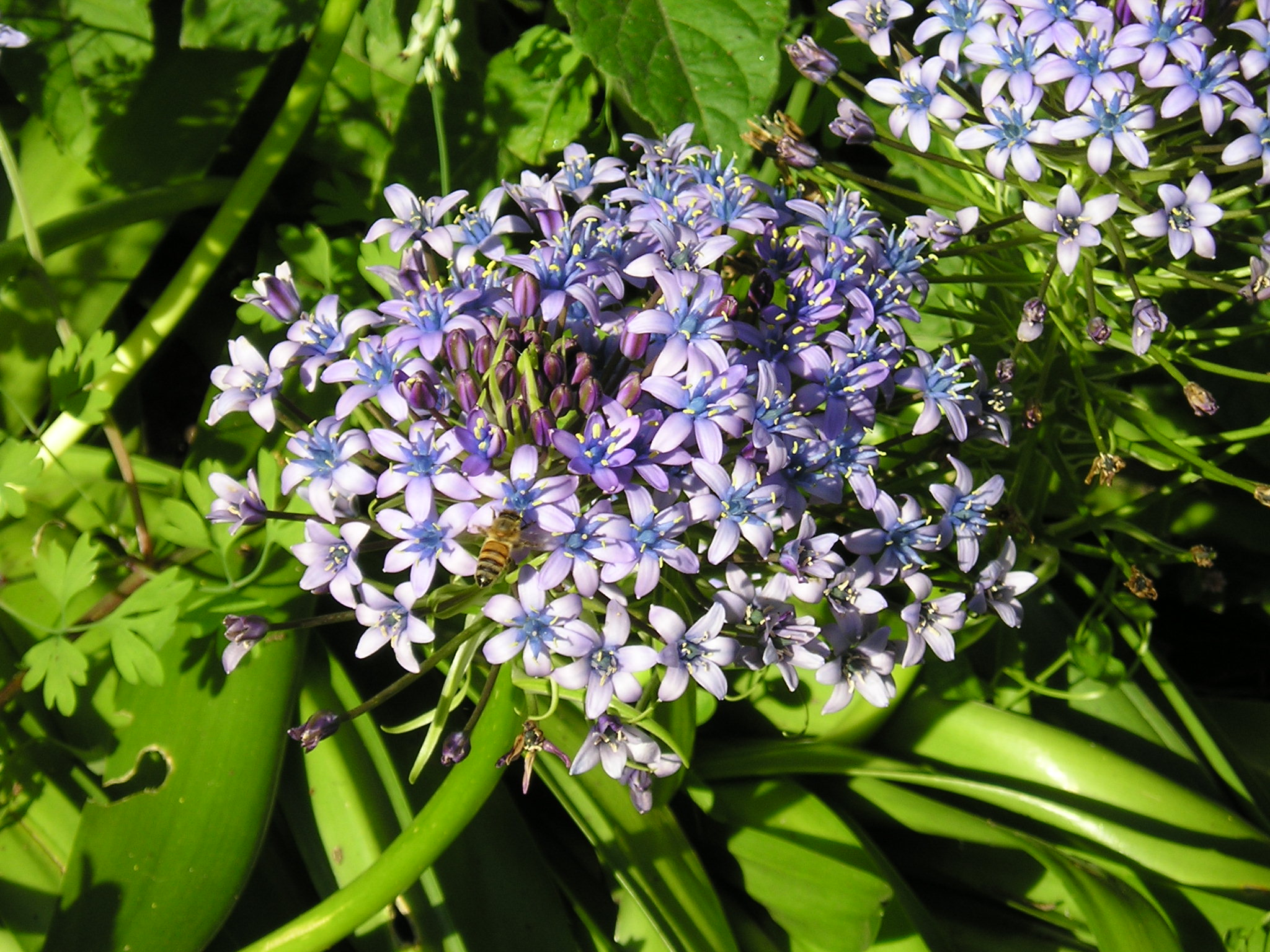 Scilla peruviana from San Francisco Botanical Garden, Golden Gate State Park, San Francisco